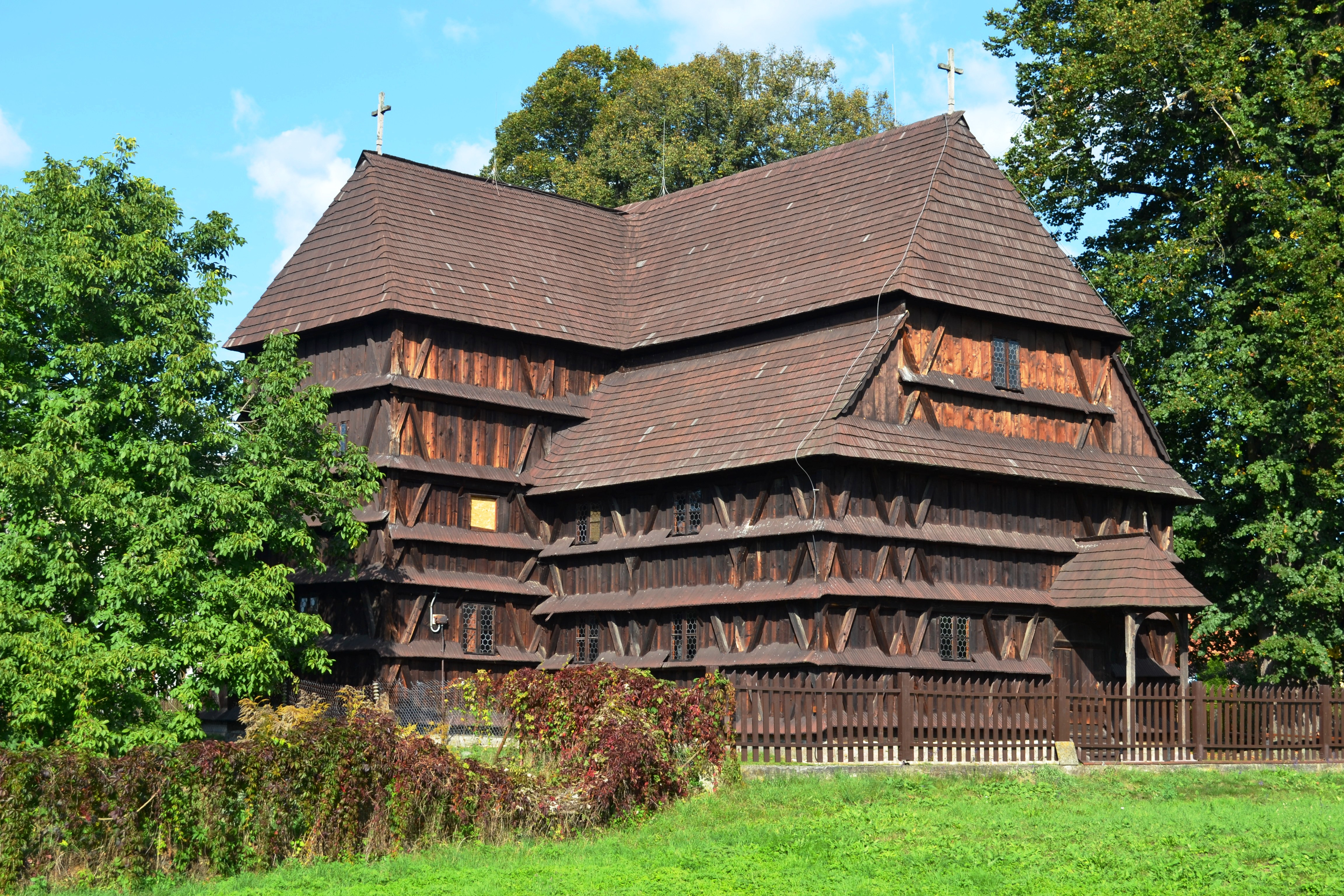 Drevený artikulárny kostol v Hronseku je zapísaný do Zoznamu svetového kultúrneho a prírodného dedičstva UNESCO. Drevená sakrálna architektúra je skvostom slovenskej ľudovej tvorby. Zvláštnosťou je, že objekty sú postavené výlučne z dreva a pri ich stavbe nemohol byť použitý ani jeden klinec. Vyznačujú sa originalitou a jedinečným technicko-umeleckým riešením